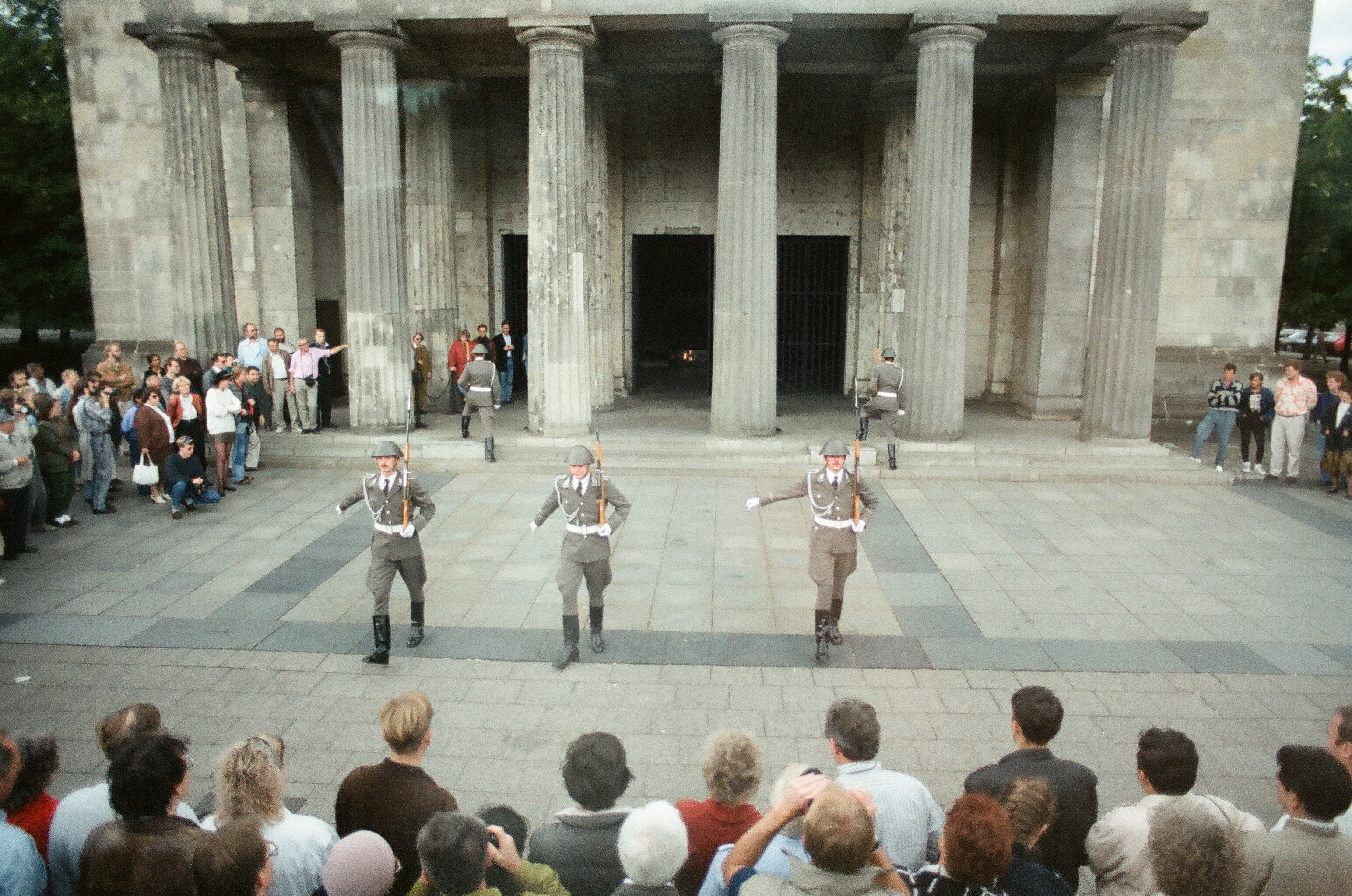 Wachablösung an der Alten Wache